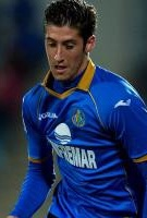 Pedro López en un getafe- levante